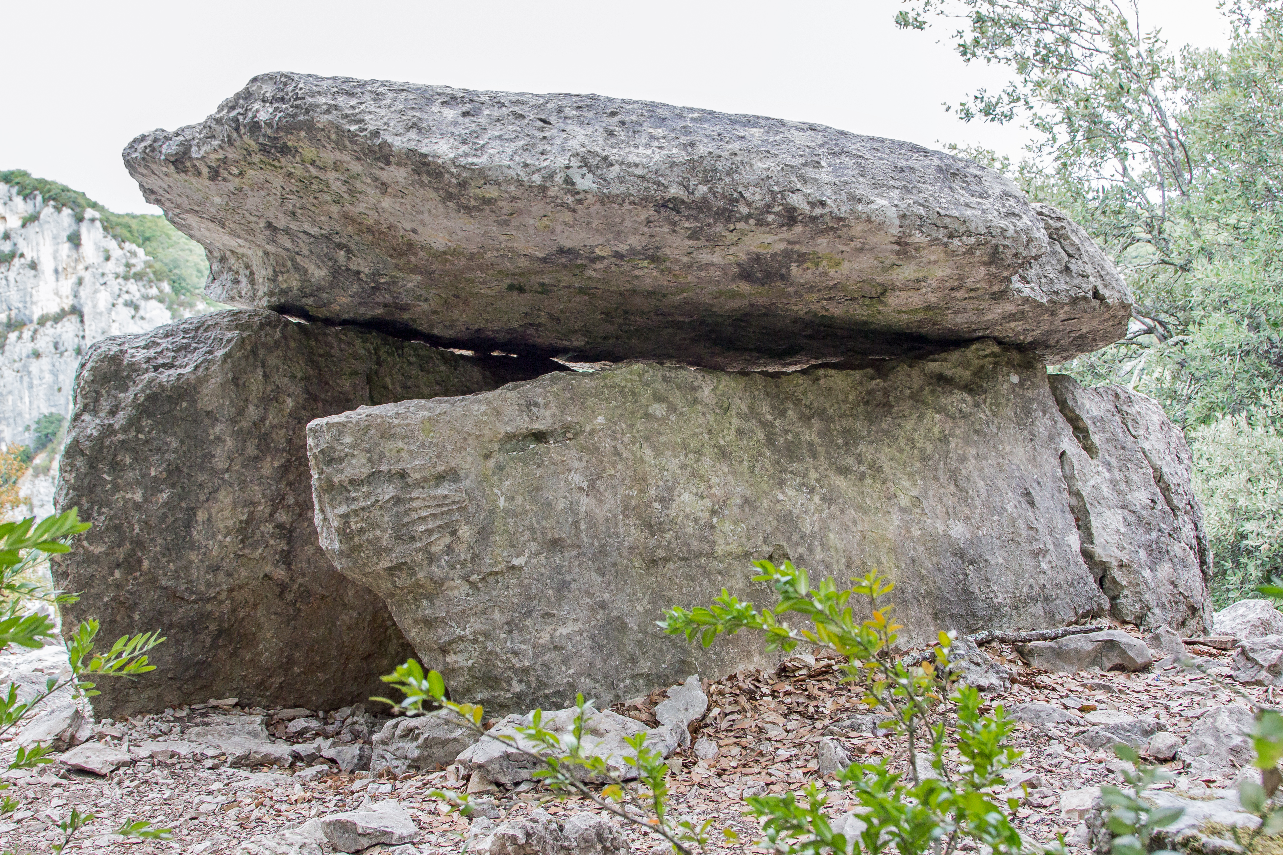 Dolmen du Chanet in Ardèche, Frankreich